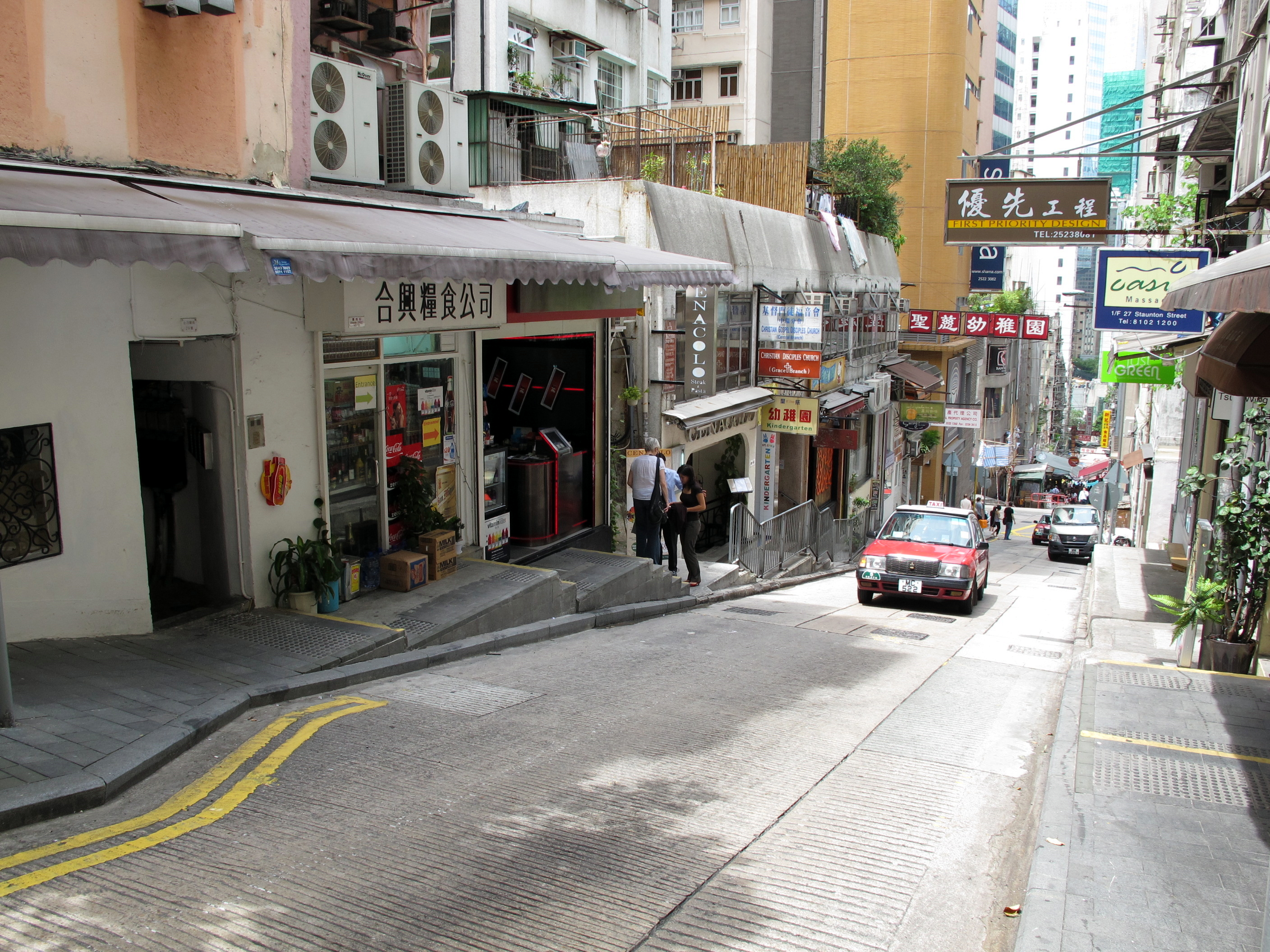 Garham Street 嘉咸街